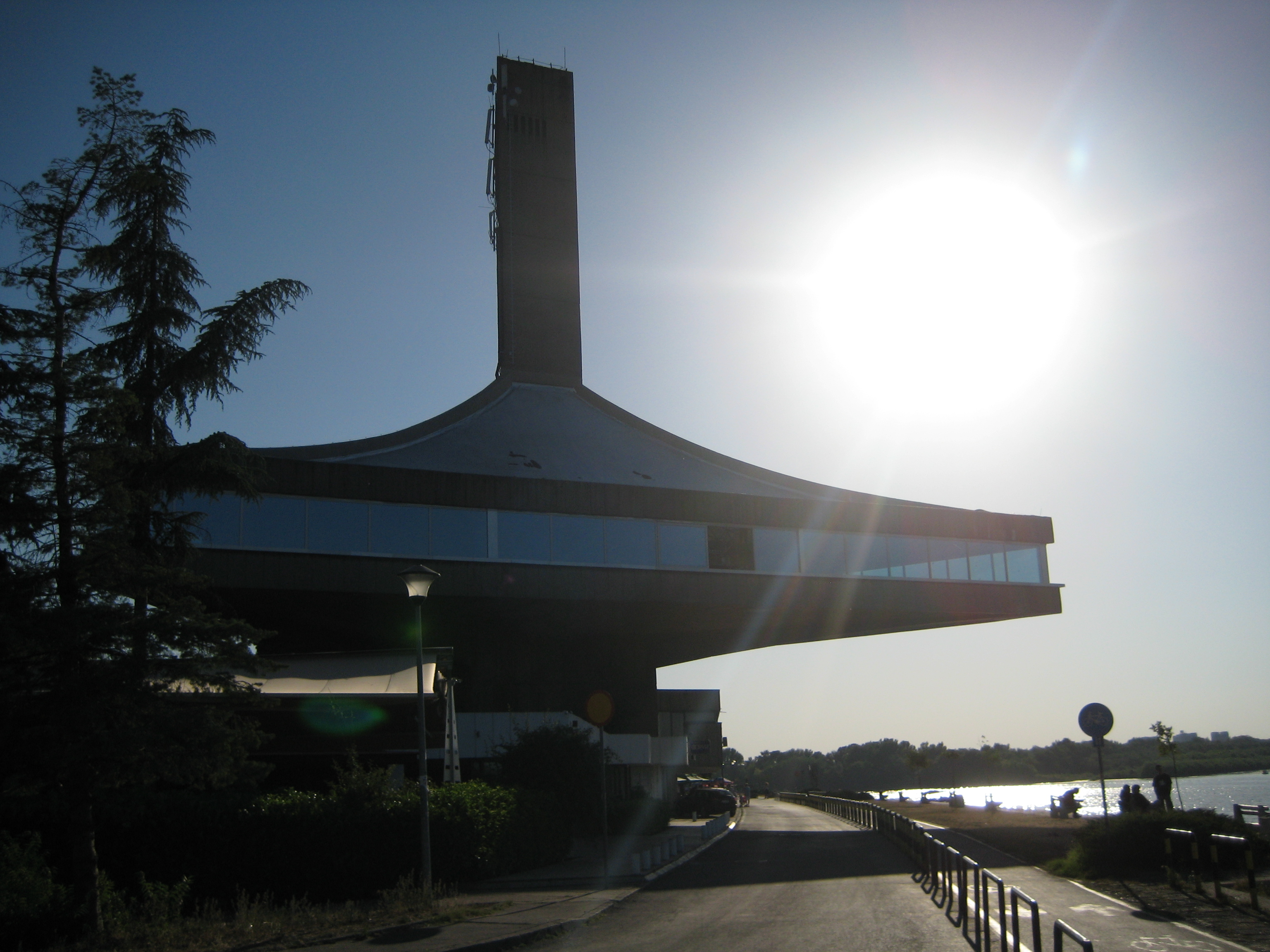 Зграда Факултета информационих технологија на обали Дунава